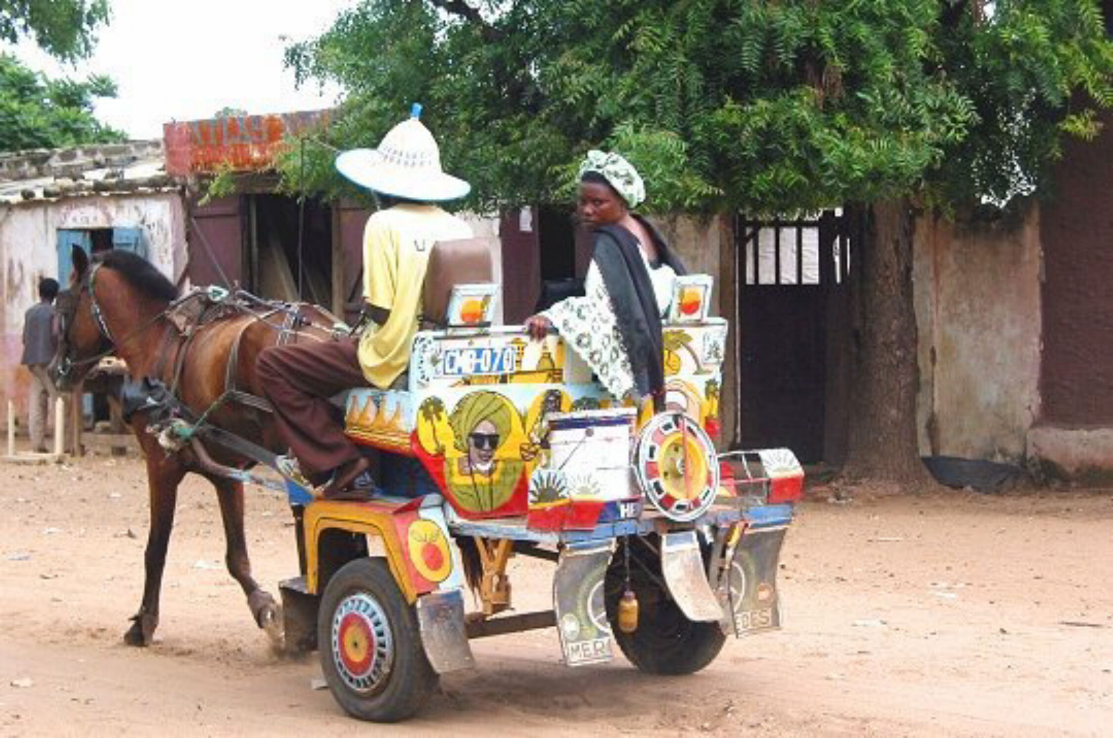 sénégal (Mbour) calèche